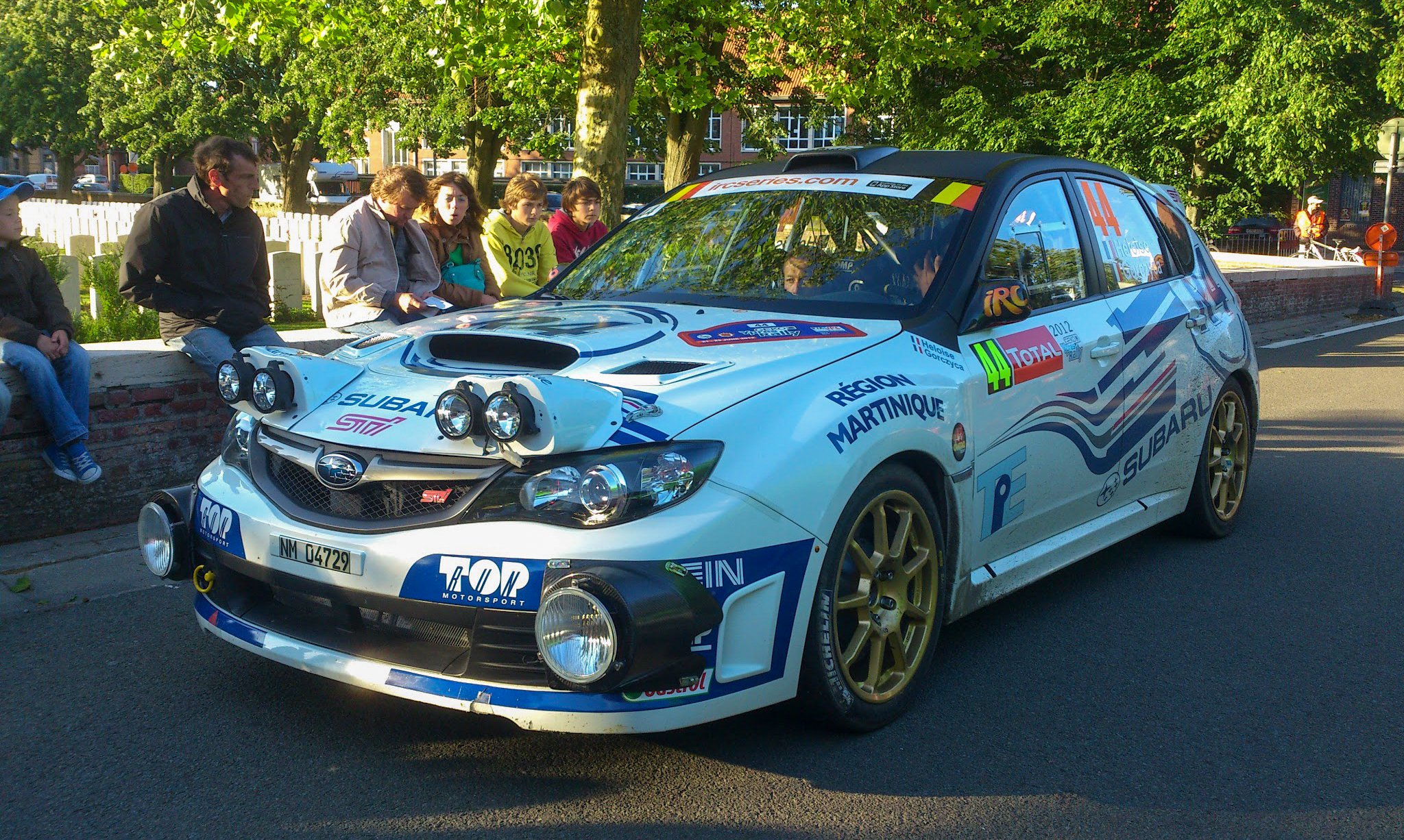 FIA GROUPE R